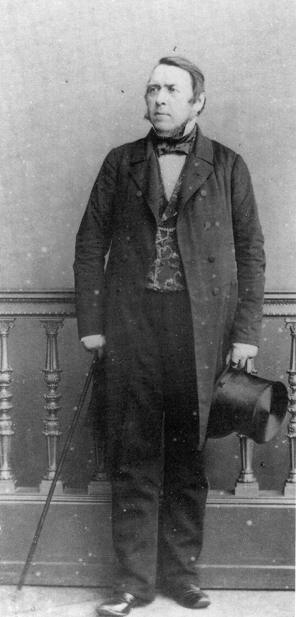 Matthias Aulike (1807-1865), Abgeordneter der Paulskirche